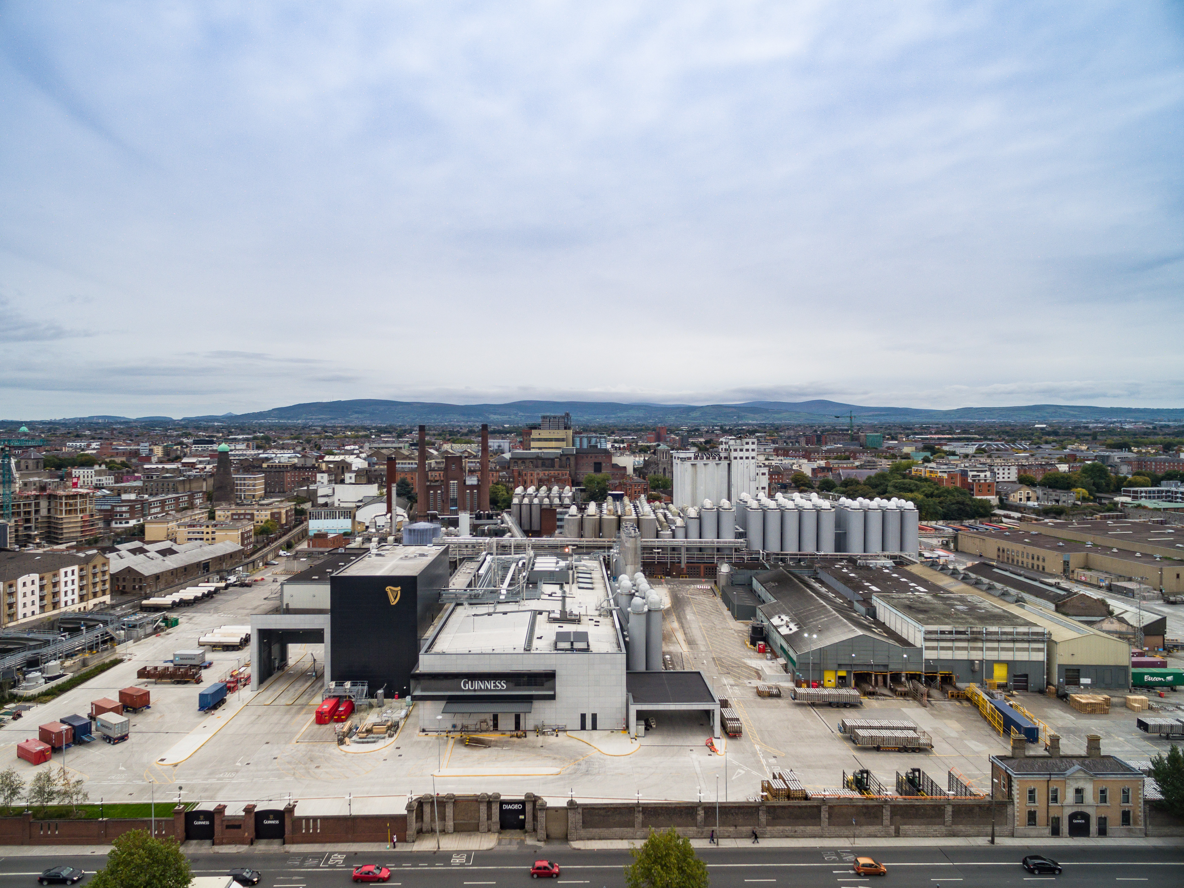 Guinness ist eine dunkle Biersorte (Stout) aus Irland.